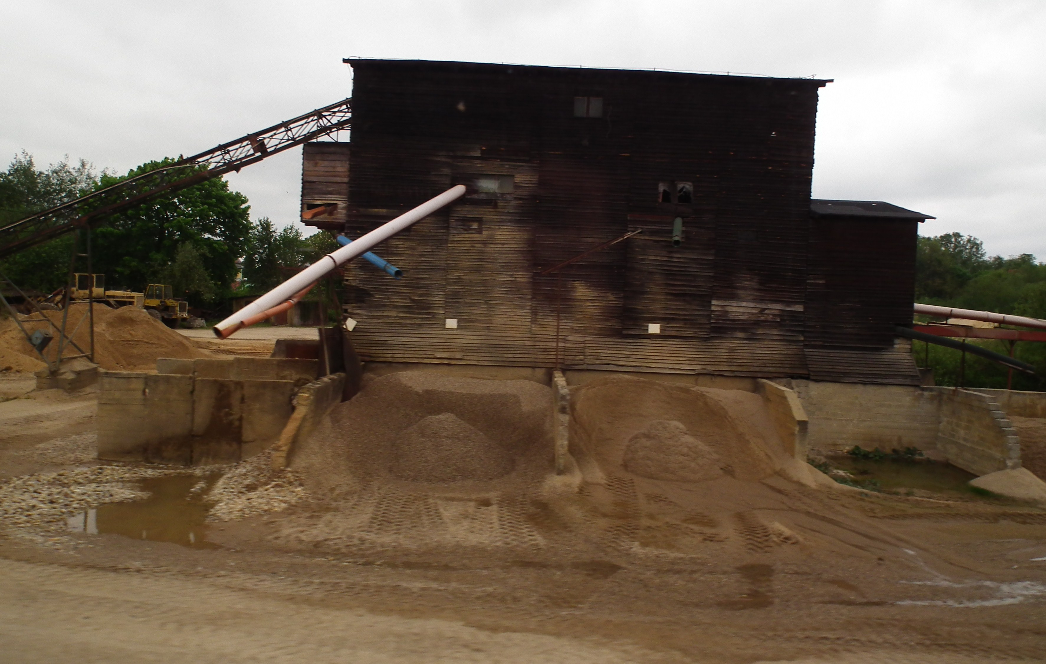 Krobusz koło Prudnika.